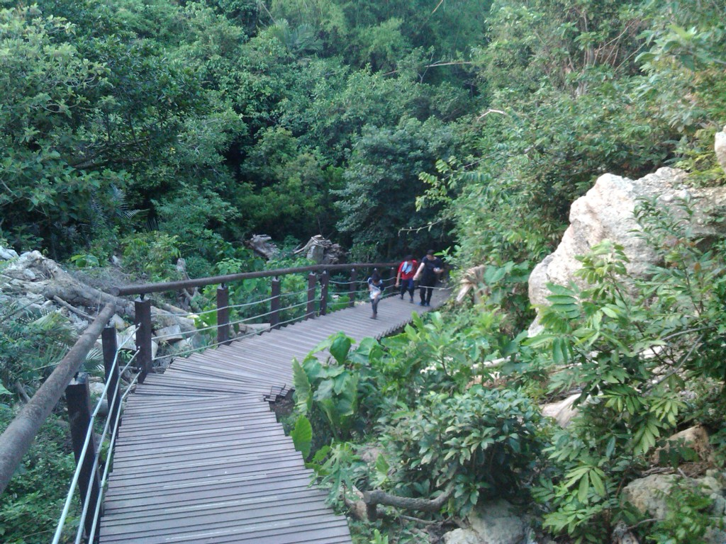 同上